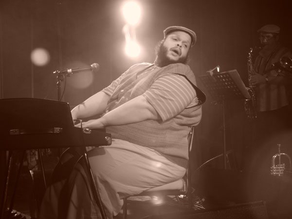 Ed Motta